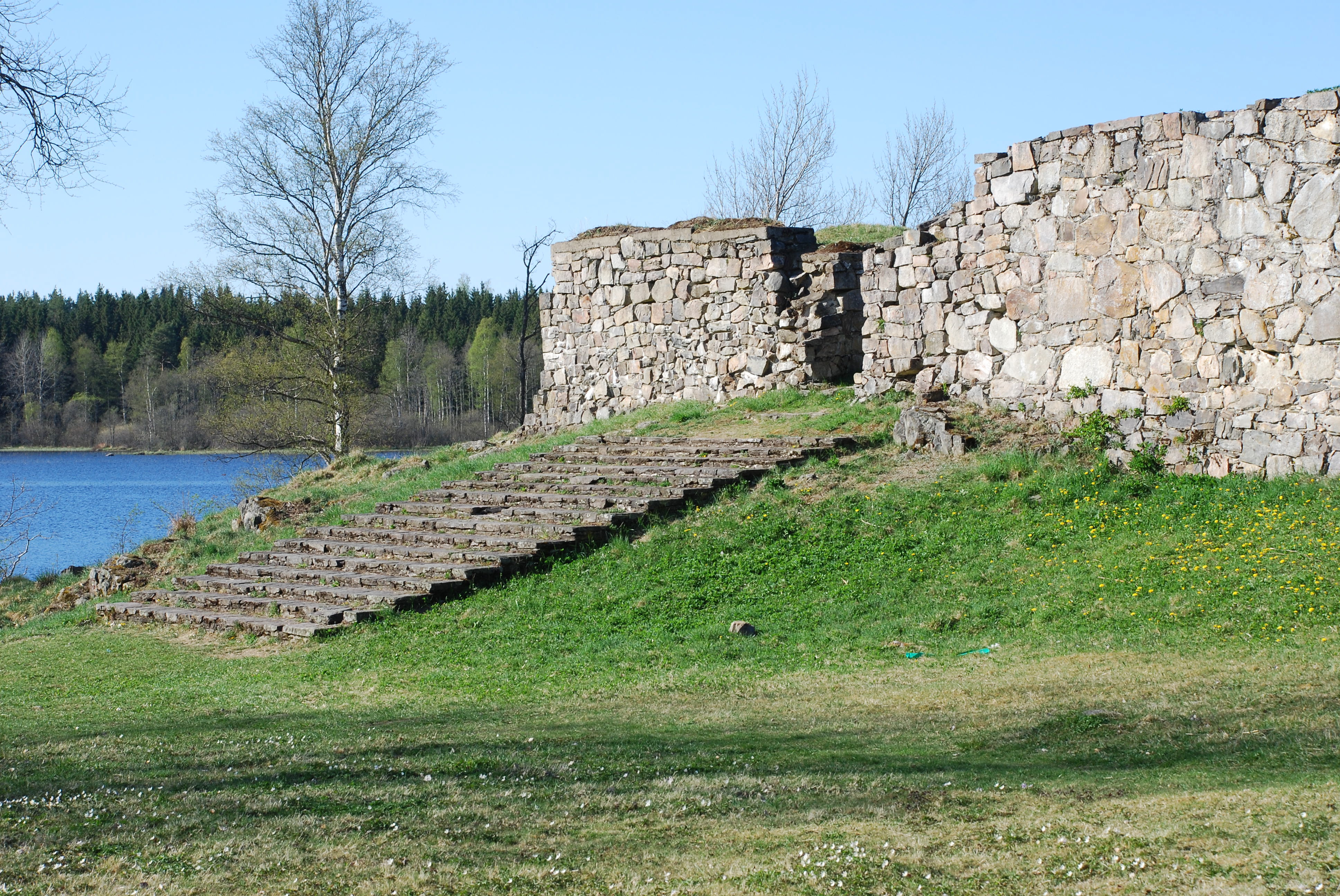 Hultaby borgruin